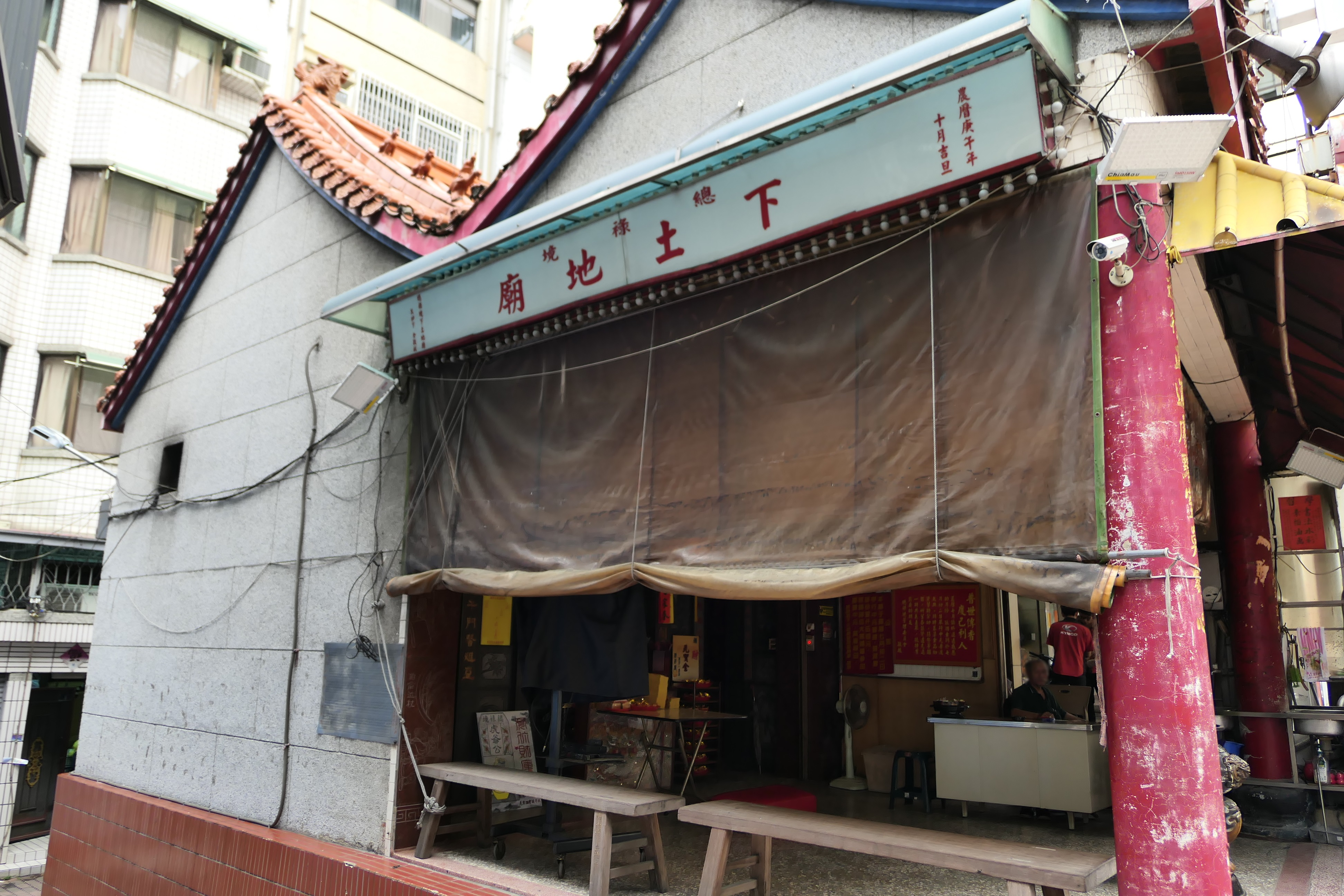 總祿境下土地廟側面